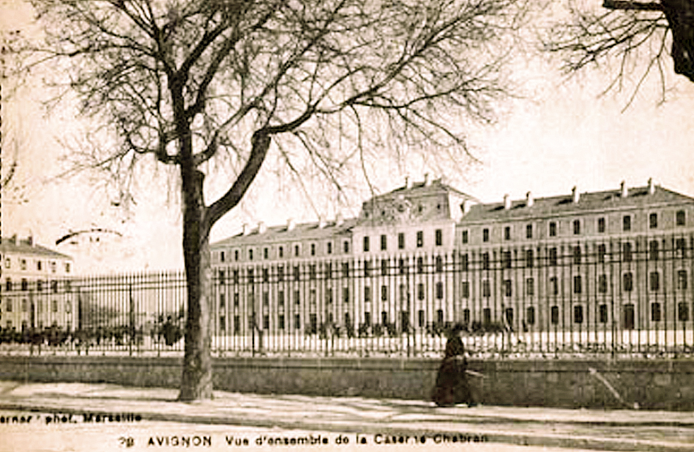 Ancienne caserne Chabran, actuellement préfecture de Vaucluse